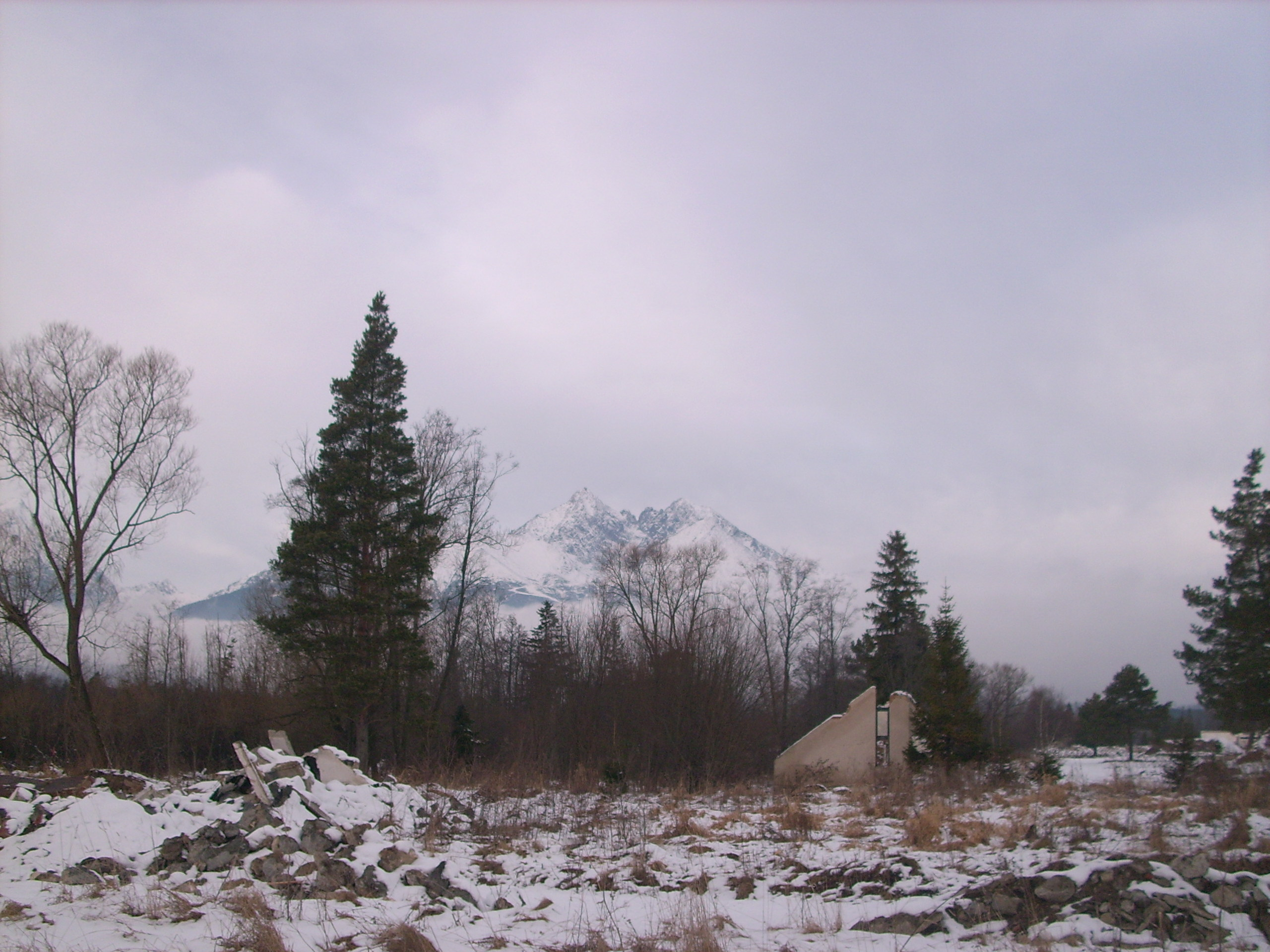 Eurocamp FICC, rekreačné a ubytovacie centrum postavené v roku 1974 južne od Tatranskej Lomnice. Torzo chatky.